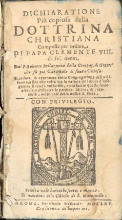 San Roberto Bellarmino, Dichiarazione più copiosa della dottrina christiana, Pier Vitale Mascardi, 1665